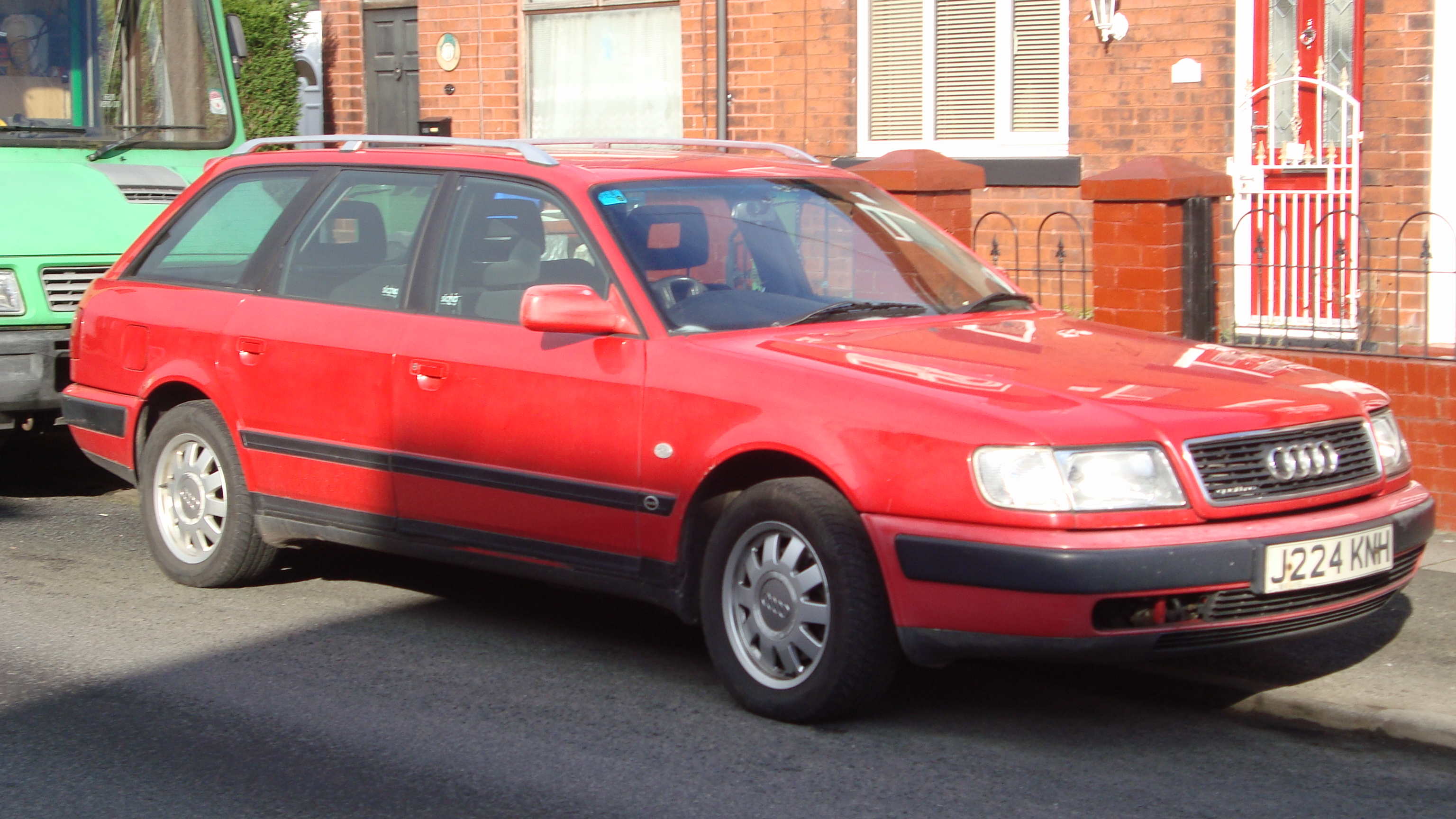 1991 Audi 100E Quattro